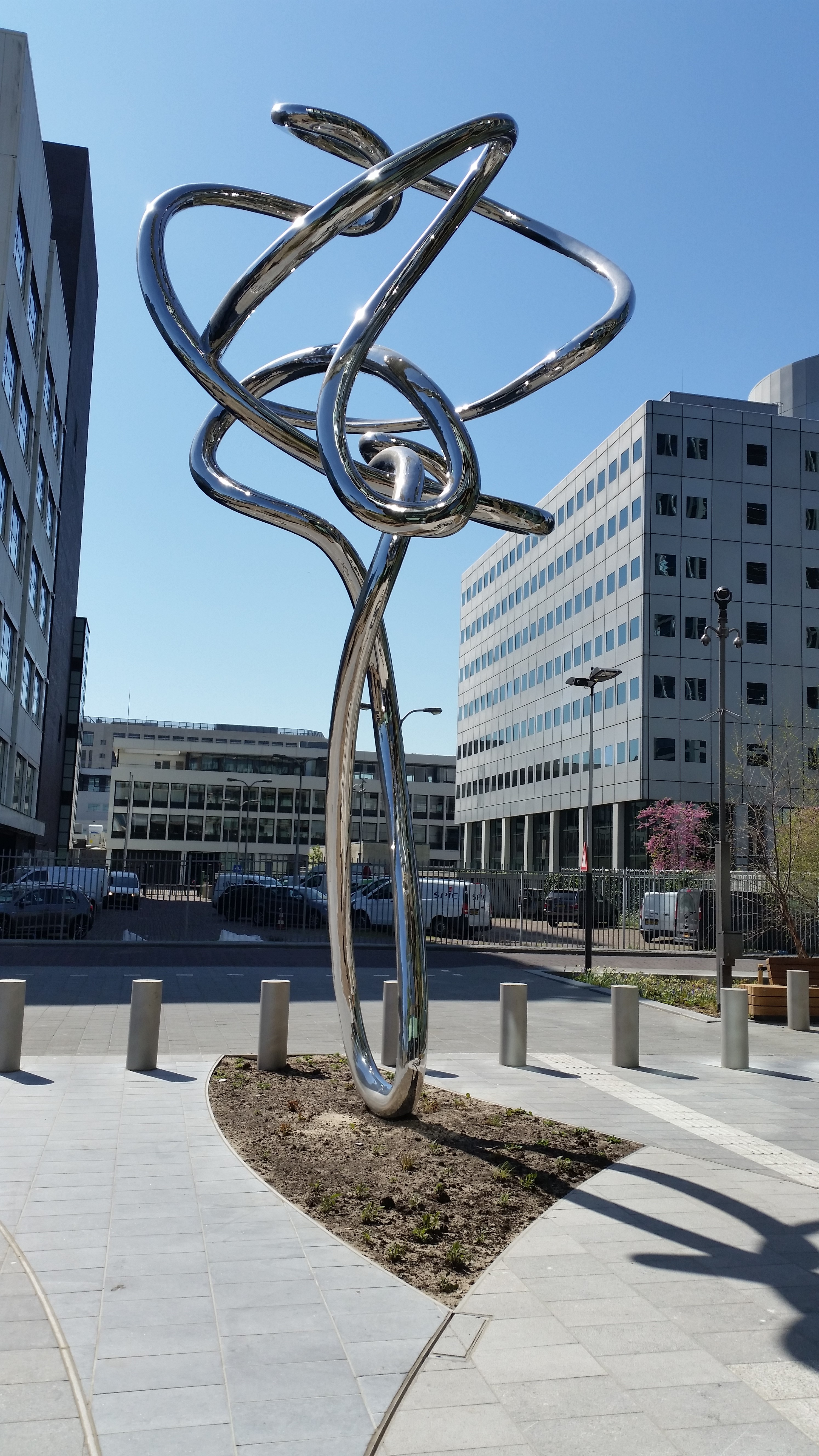 Pendulum van Gijs Assmann voor het EMA-gebouw, Amsterdam-Zuid